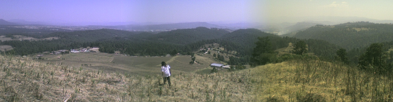 panorama de el picacho coatepec de harinas